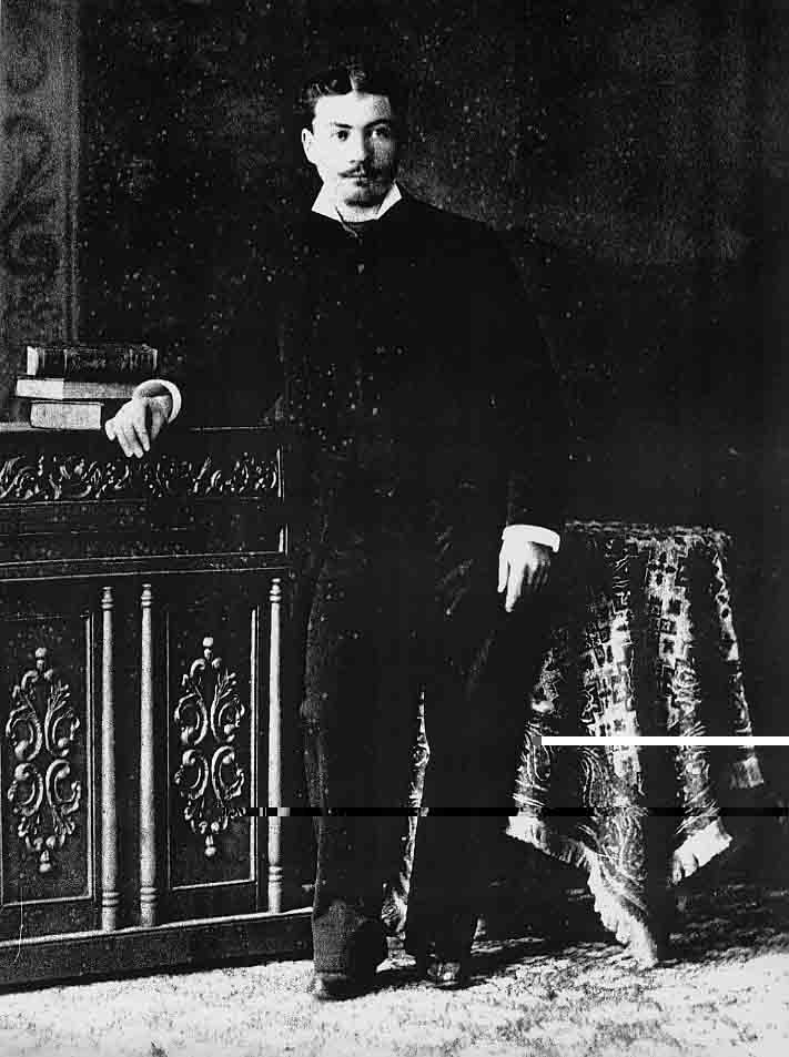 pendant son apprentissage à Mexico